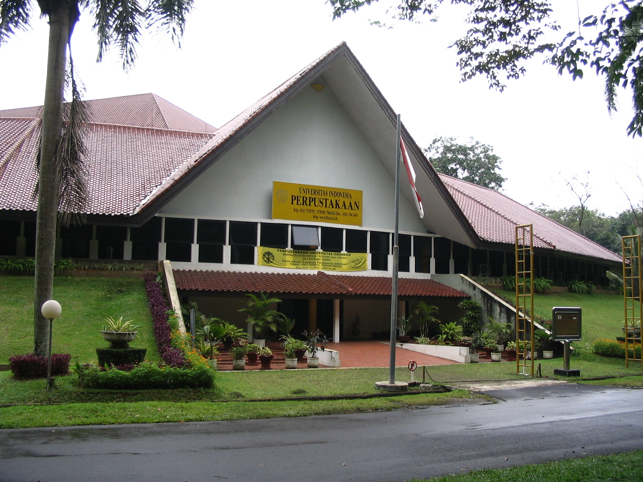 Universidad de Indonesia, entrada a la biblioteca principal, Campus de Depok, Gran Yakarta.